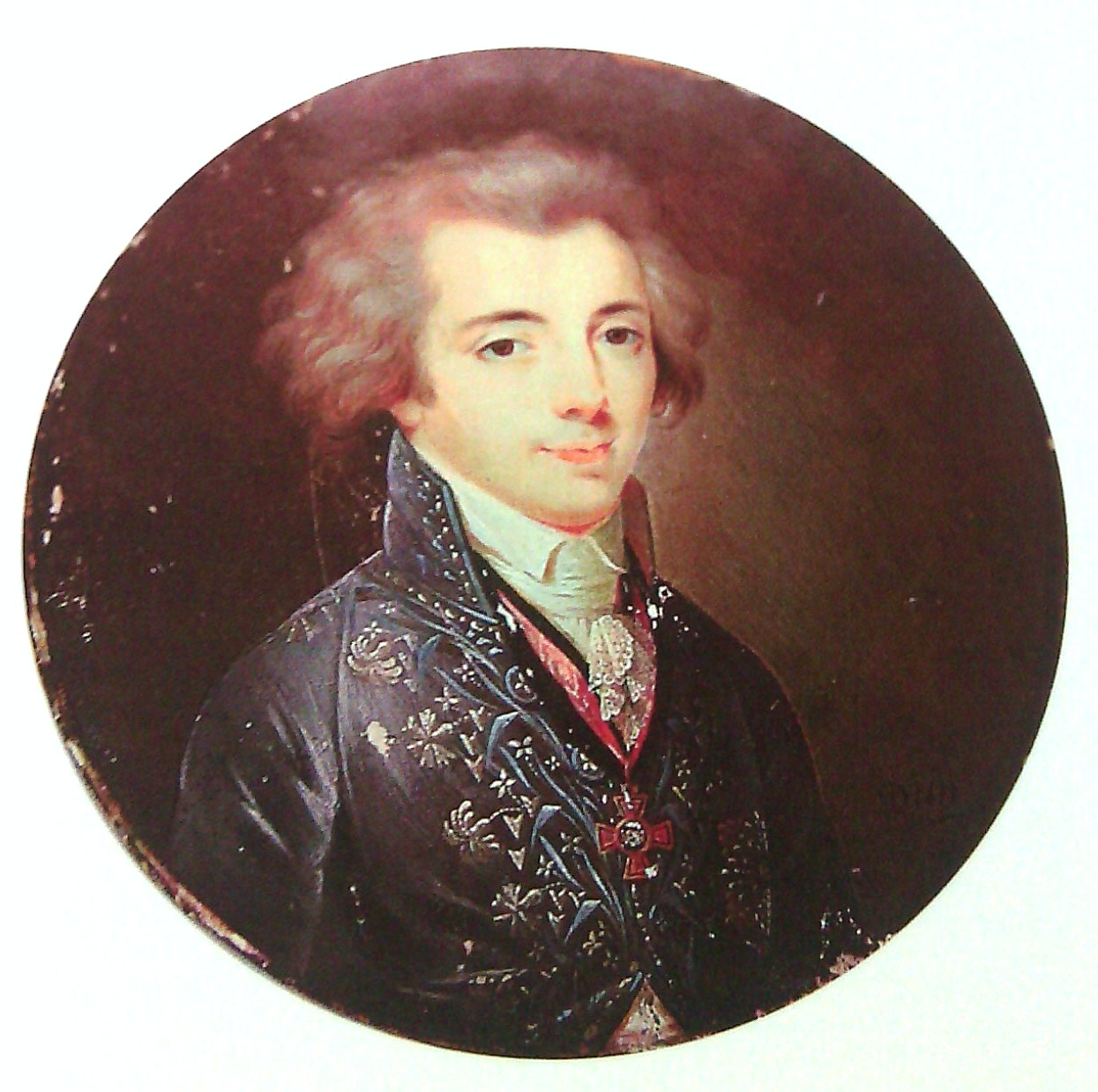 Павел Мартынович Скавронский